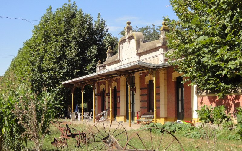 Estación Altamira del FCGB, ex FFCC CGBA